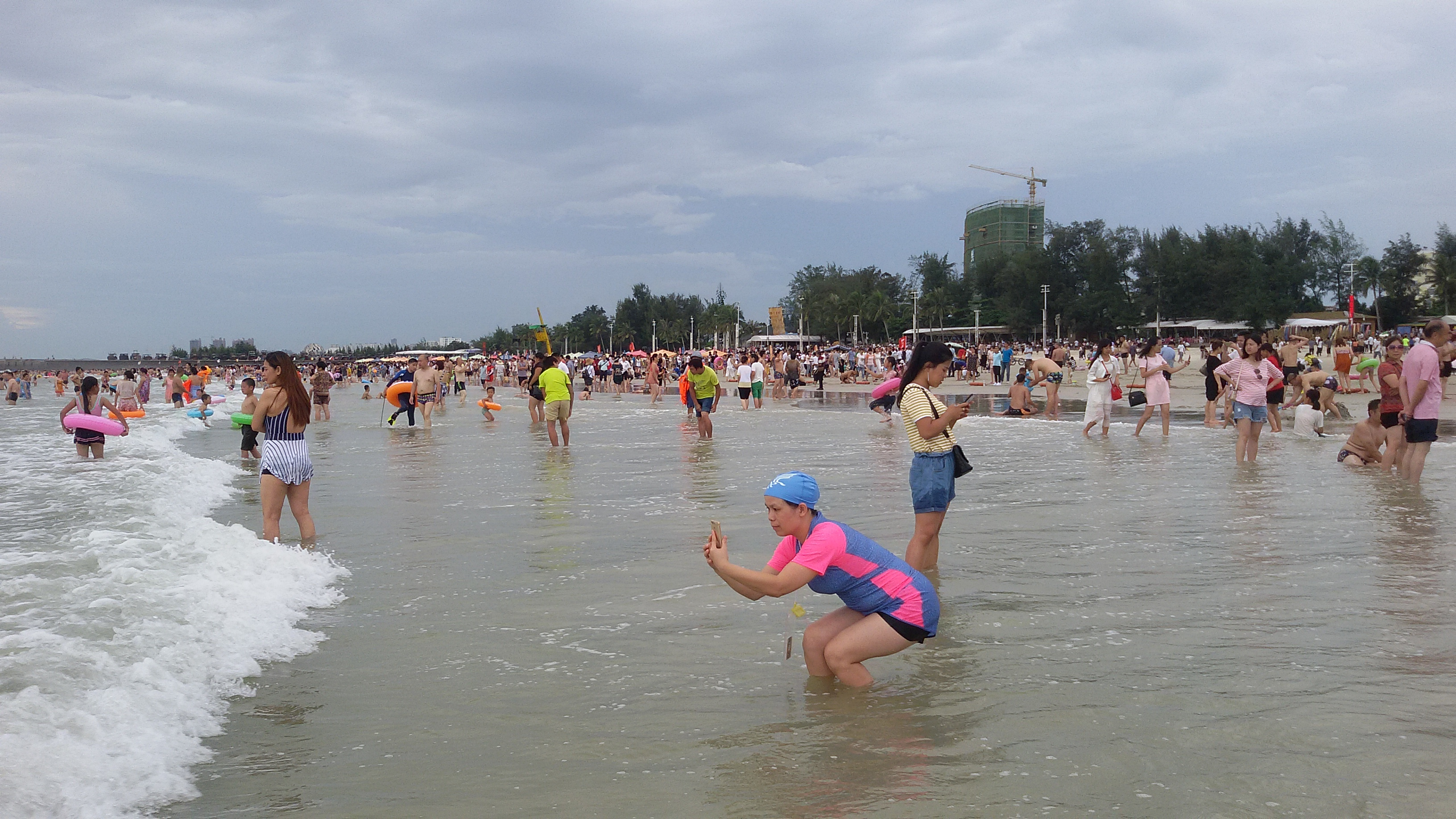 粵語: 北海銀灘中區（活動區）